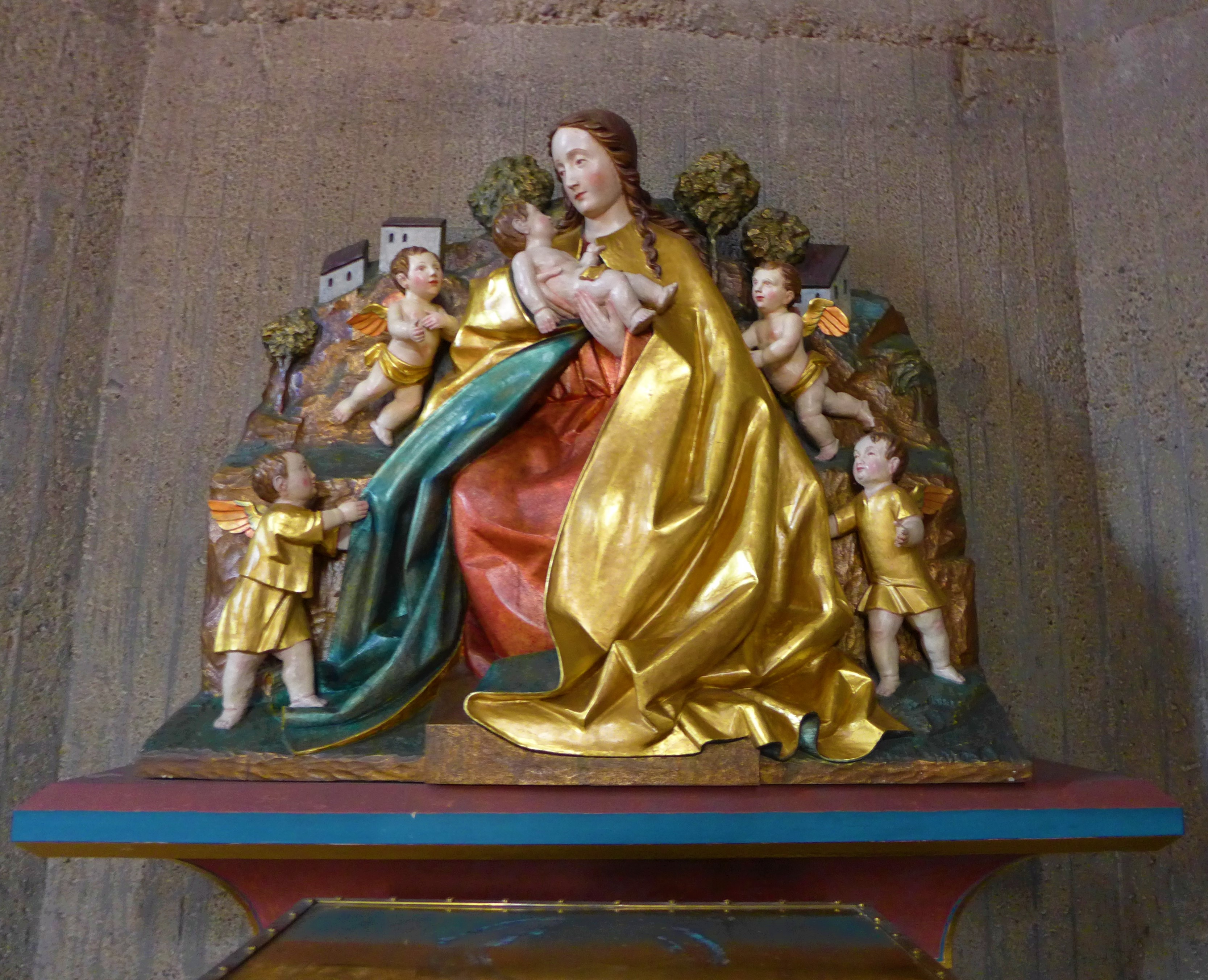 St. Ludwig (Saarlouis), Figurengruppe "Maria mit dem Jesuskind"